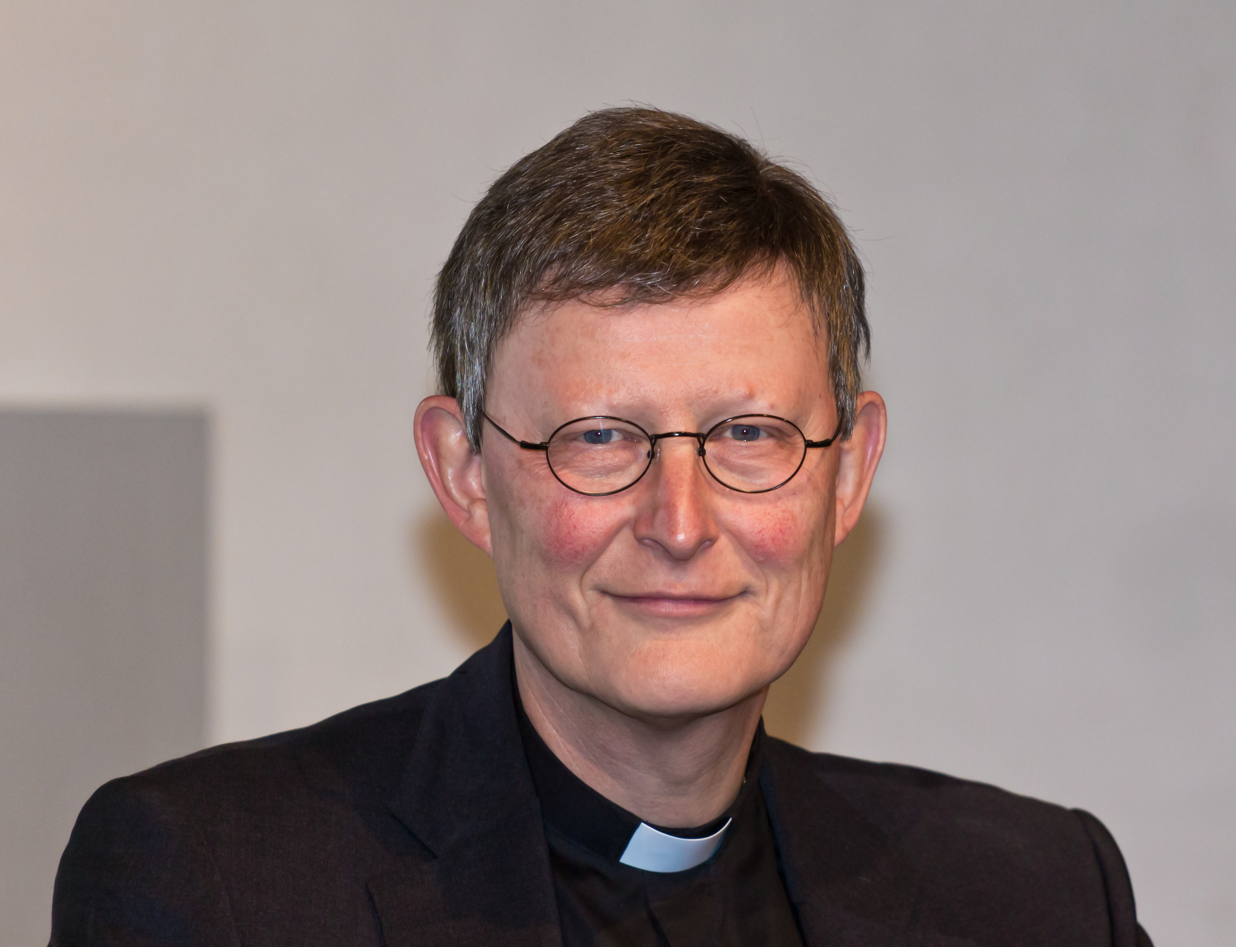 Pressekonferenz zur Ernennung von Rainer Maria Kardinal Woelki zum Erzbischof von Köln